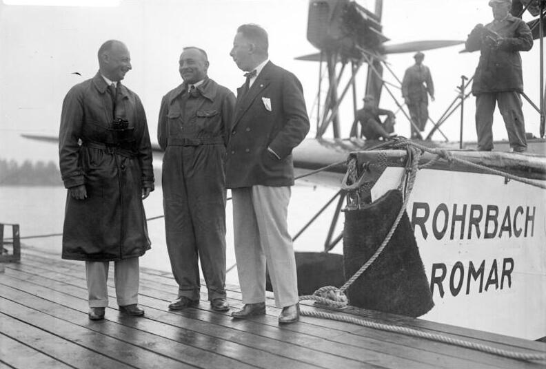 Chef-Pilot Steindorf abgestürzt! Einer der bekanntesten deutschen Flugzeugführer, Chef-Pilot Hermann Steindorf (Mitte) ist in Staaken bei einem Probeflug abgestürzt und schwer verletzt worden.